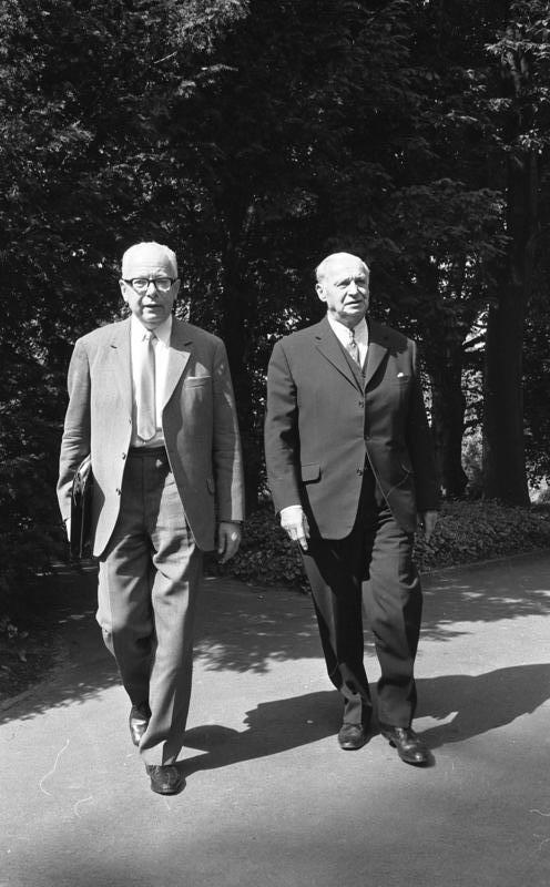 Bundespräsident Heinemann empfängt Prof. Dr. Weichmann, ehemaliger Bürgermeister der Freien- u. Hansestadt Hamburg